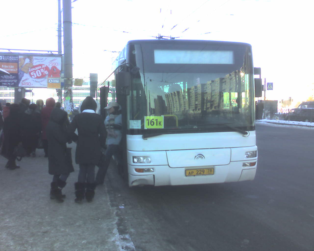 Автобус Yutong ZK6118HGA ООО "ПТК" в Санкт-Петербурге. - Bus Yutong ZK6118HGA, OOO "PTK", St. Petersburg